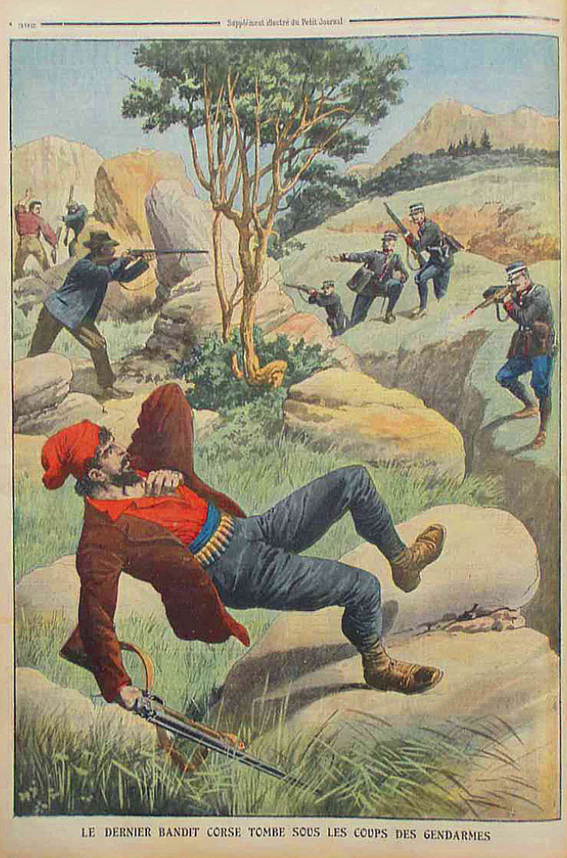 Mort du dernier bandit corse à la fin du XIXe siècle